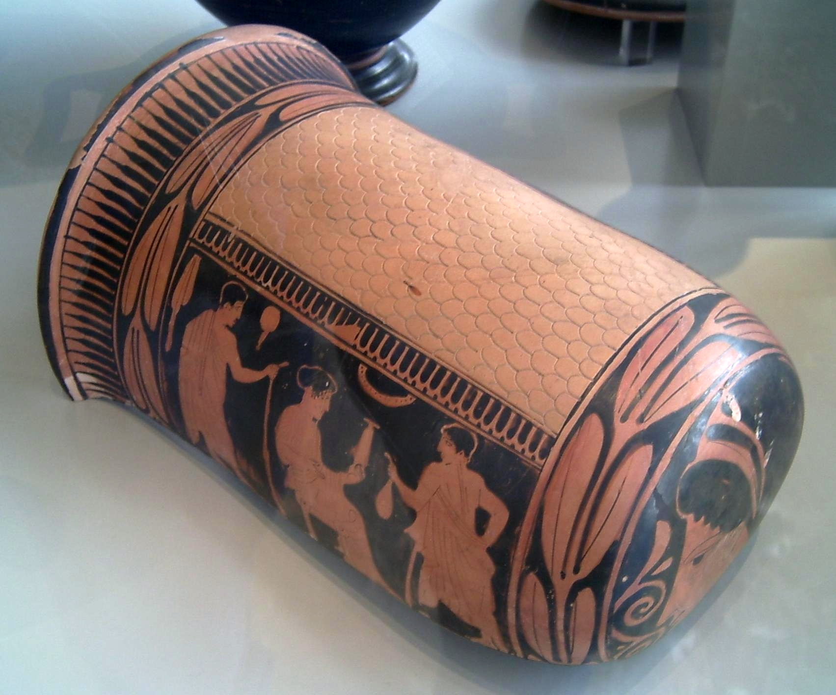 Attisch-rotfigurig verziertes Epinetron, um 450 v. Chr., beidseitig mit Jünglingen und Frauen verziert